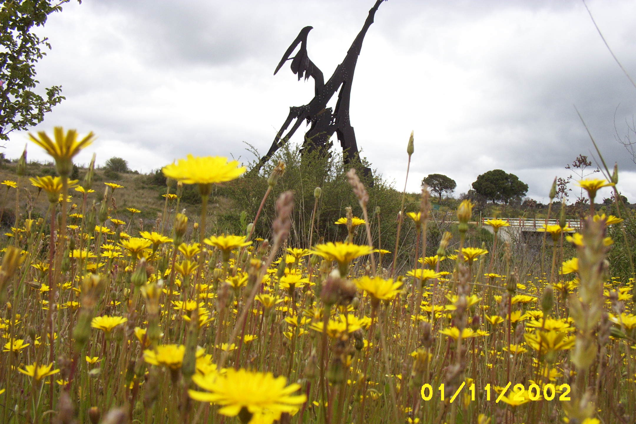 Cauquenes, Cauquenes, Maule Region, Chile